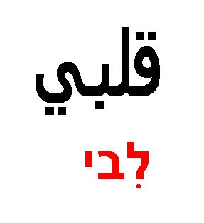 לשימוש בערך ערבית דרוזית